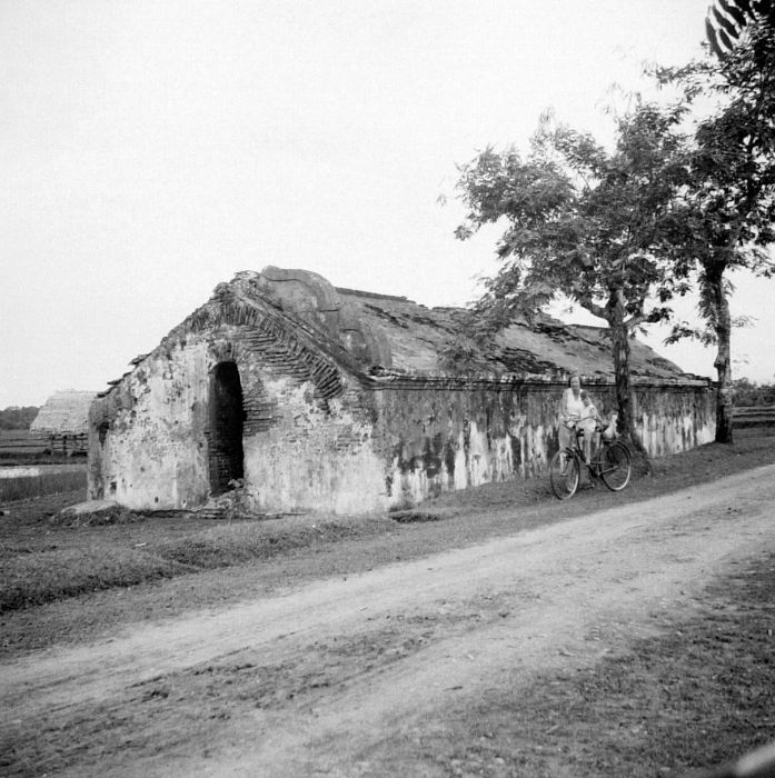 Negatief. Europese vrouw op fiets met kind voor het filterhuis voor de waterleiding die loopt van het kunstmatig aangelegde meertje Tasik Ardi naar de kraton